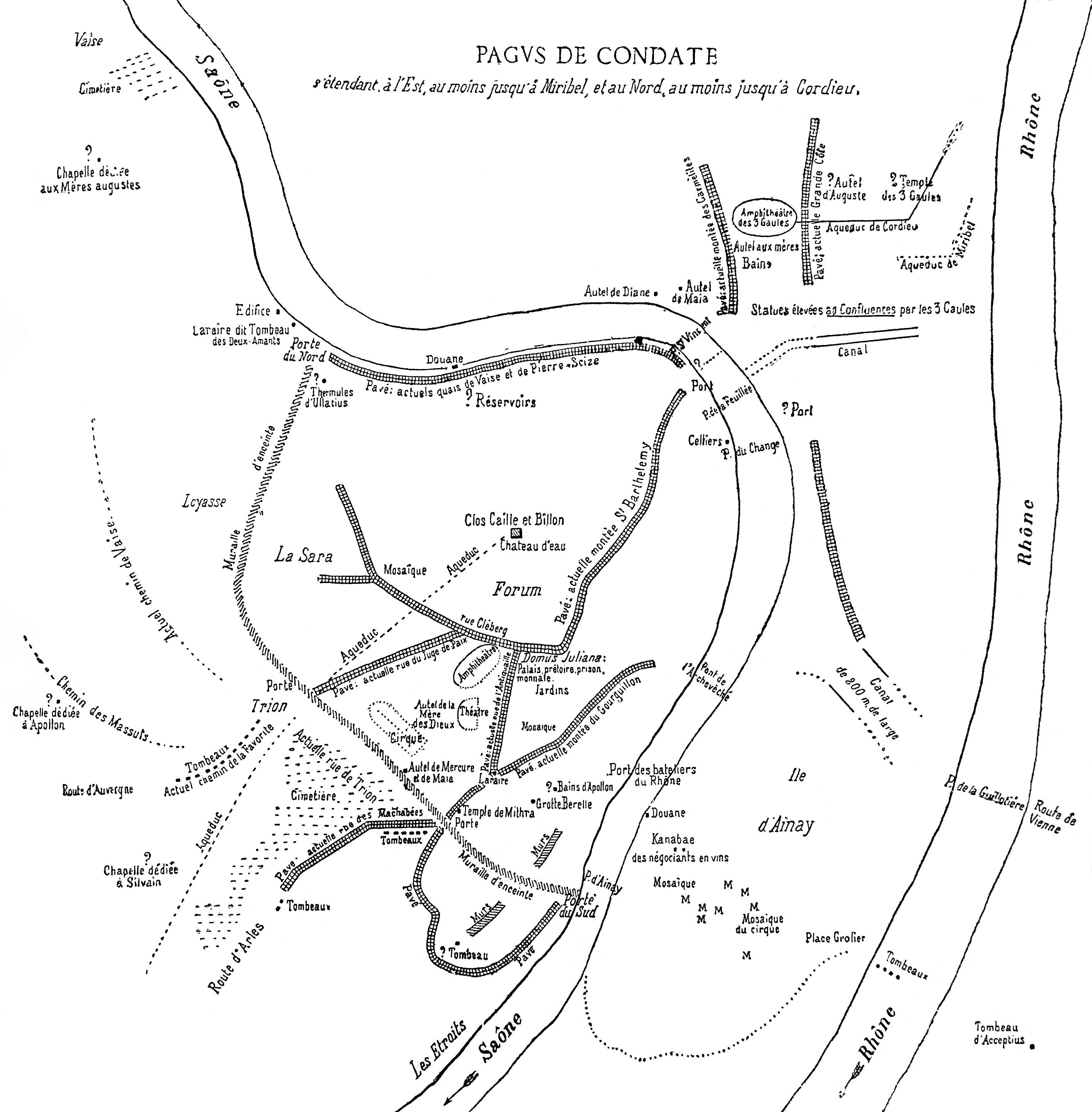 Pagus de Condate - Plan de Lyon antique. Inscriptions antiques, tome III, A. Allmer et P. Dissard, Lyon, Léon Delaroche, 1890.